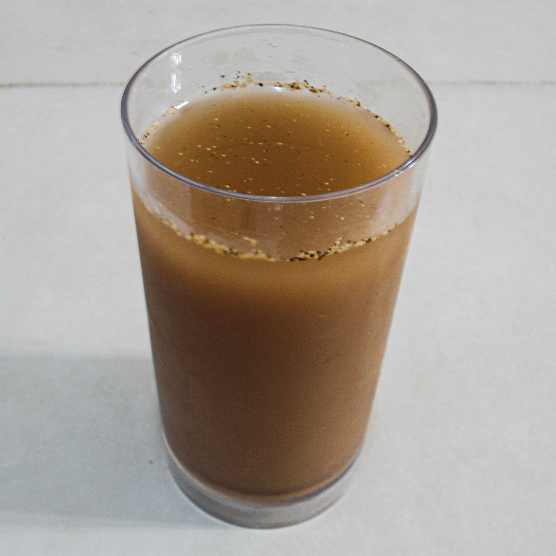 "Polvillo" listo para beberse. Es una bebida típica del estado de Tabasco, México, la cual se elabora con harina de maíz tostado, adicionada con cacao tostado y molido. Se puede beber frío o caliente y se la añade azúcar o puede tomarse simple.